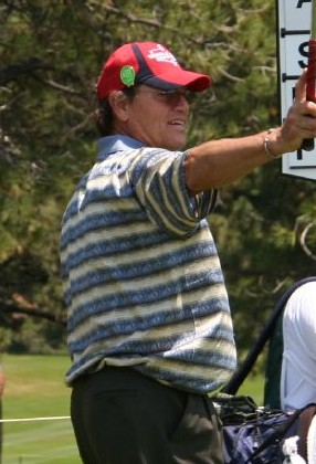 Carlton Fisk